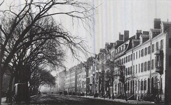 Boston, Massachusetts